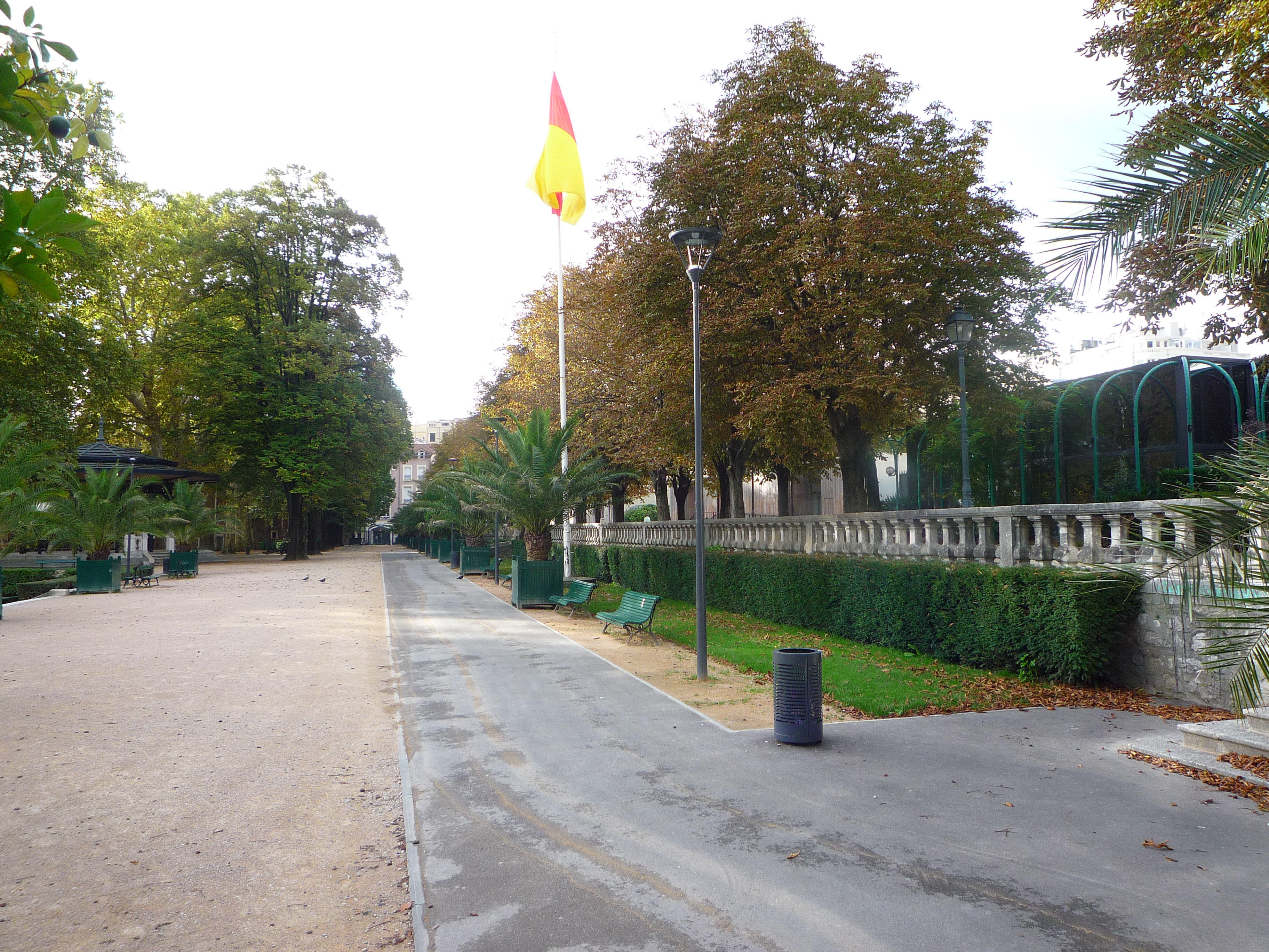 Terrasse du Jardin de ville à Grenoble avec le drapeau jaune et rouge de la ville.